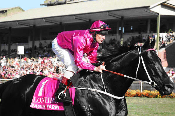 Lonhro